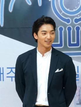 18일 오후 서울시 양천구 목동 SBS에서 SBS 새 금토드라마 '의사 요한' 제작발표회가 열려 배우 지성X이세영X이규형X황희X정민아X김혜은X신동미가 참석해 개별 포토타임을 갖고 있다.